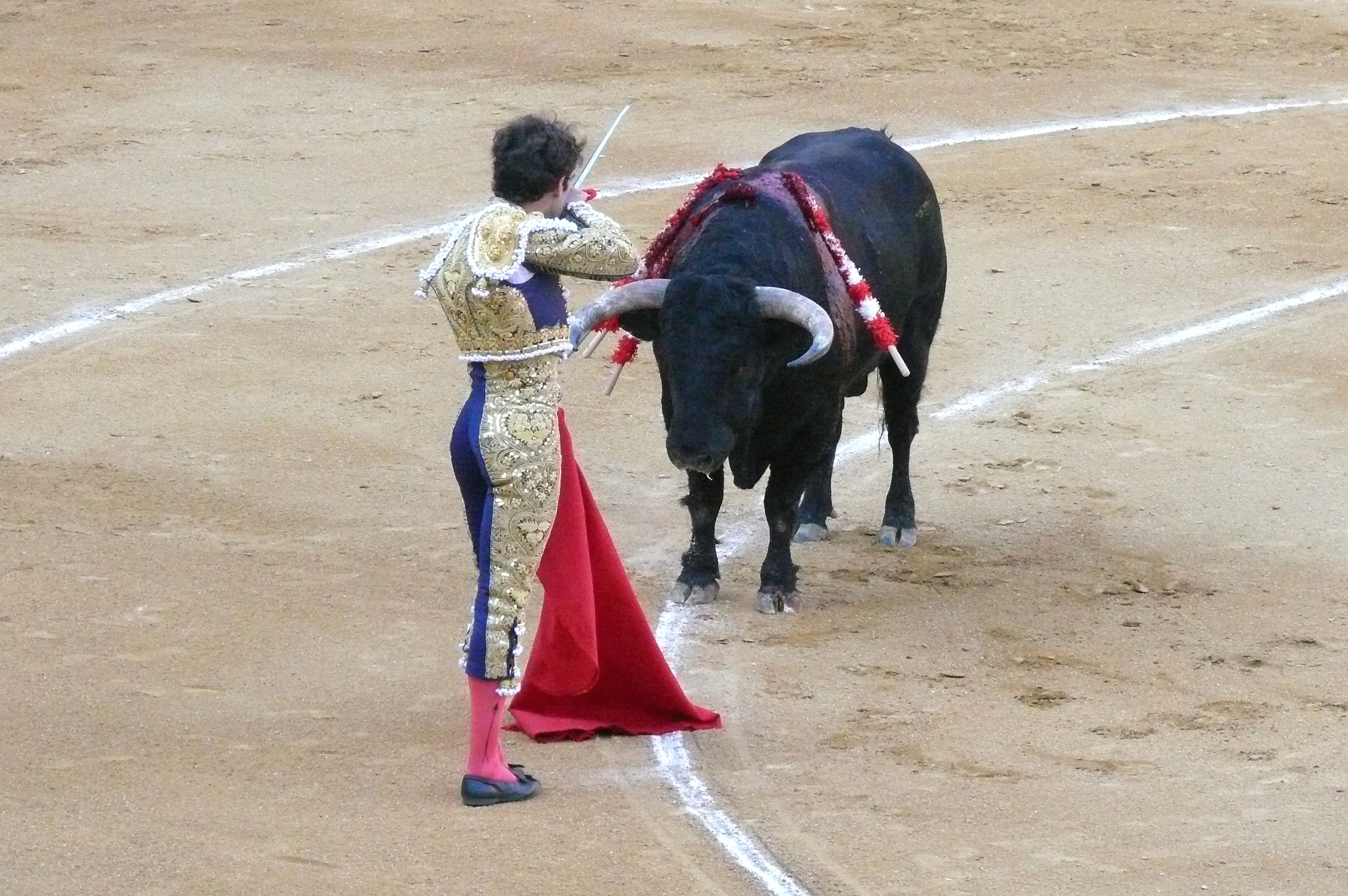 José Tomás entrando a matar. Almería (agosto 2008).